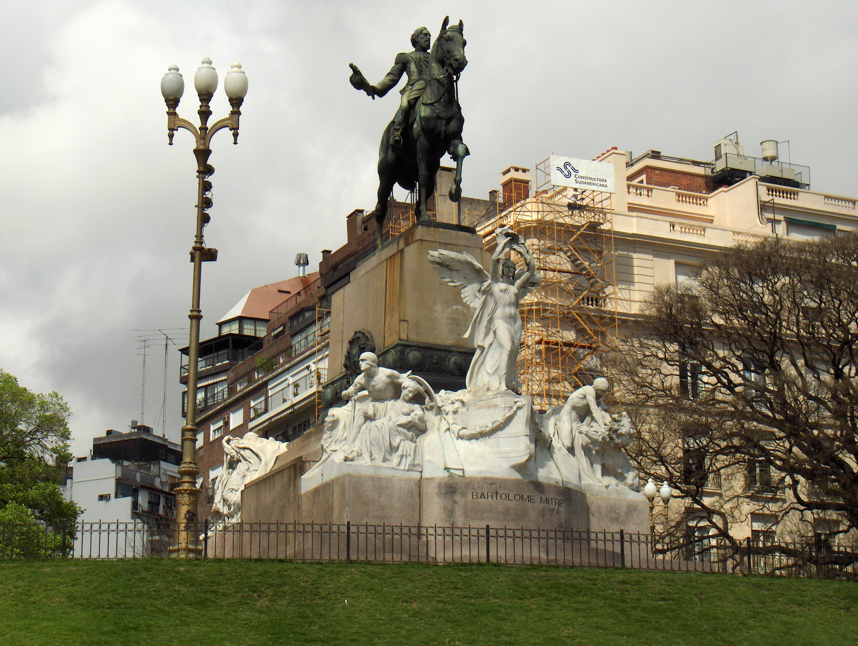 Monumento a Bartolomé Mitre, ubicado en la Plaza Mitre del barrio de Recoleta. Ciudad de Buenos Aires